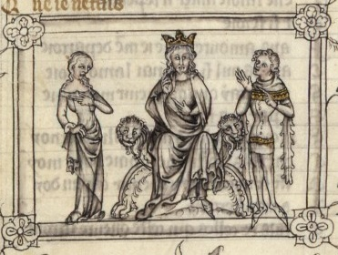 jean de luxembourg arbitrant